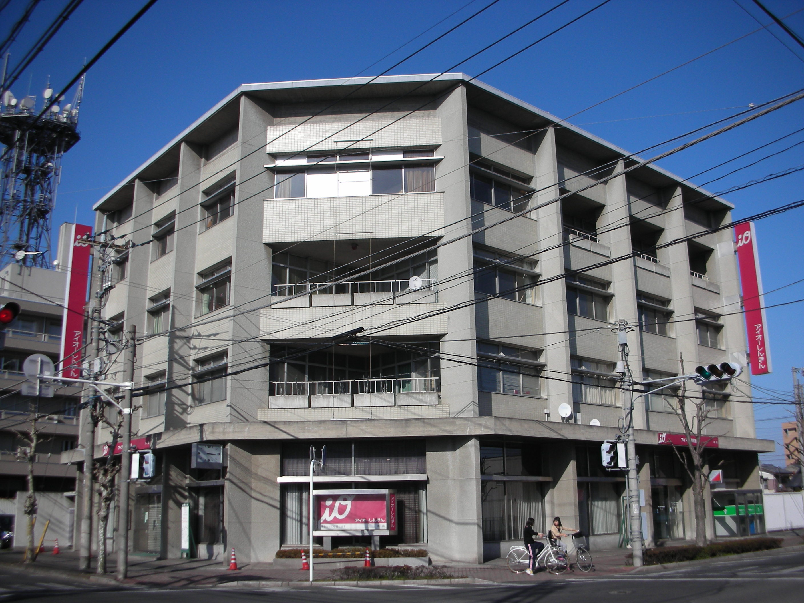 アイオー信用金庫本店（群馬県伊勢崎市中央町）の外観。